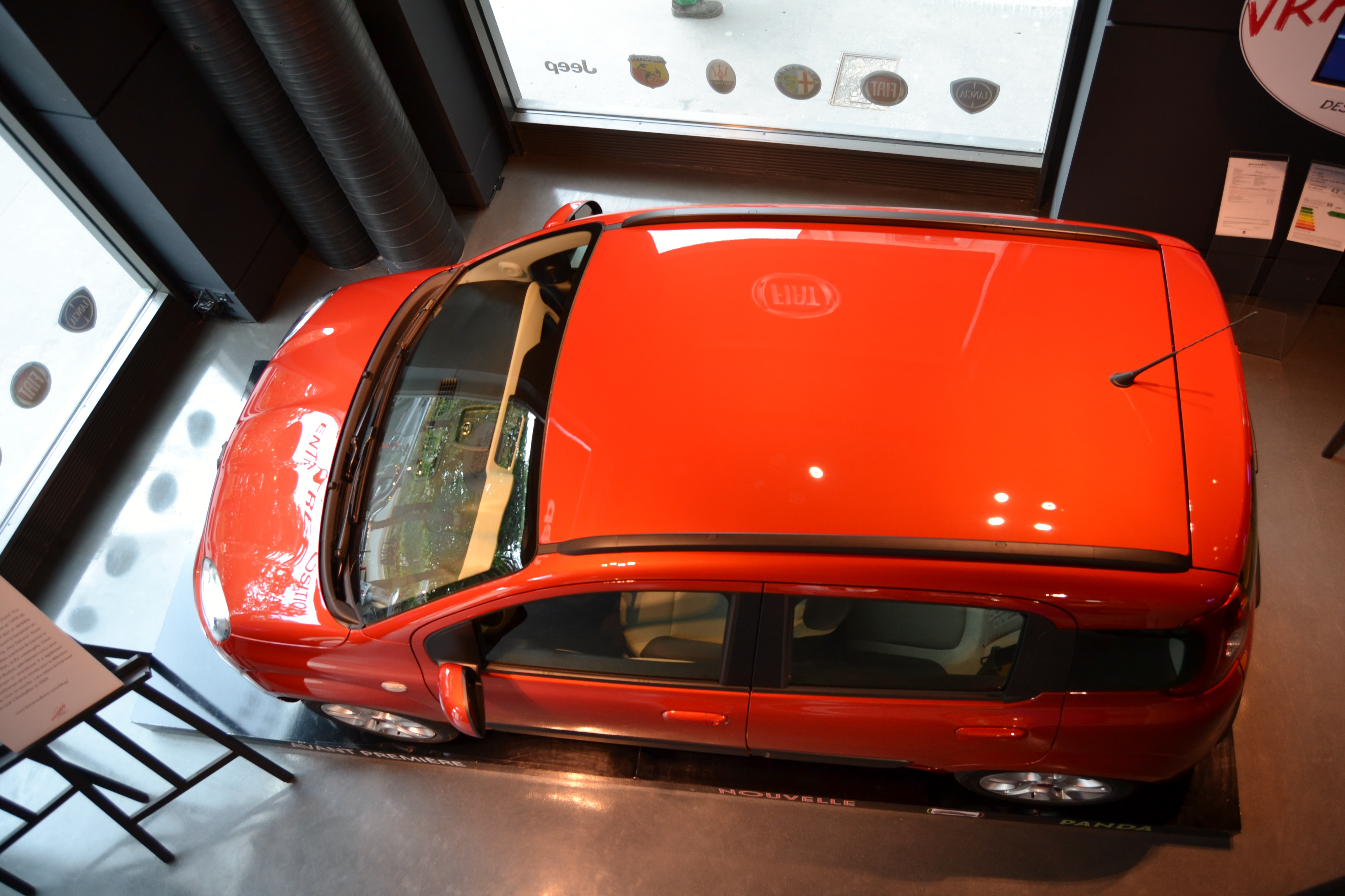 Fiat Panda 2012 - Vista superior